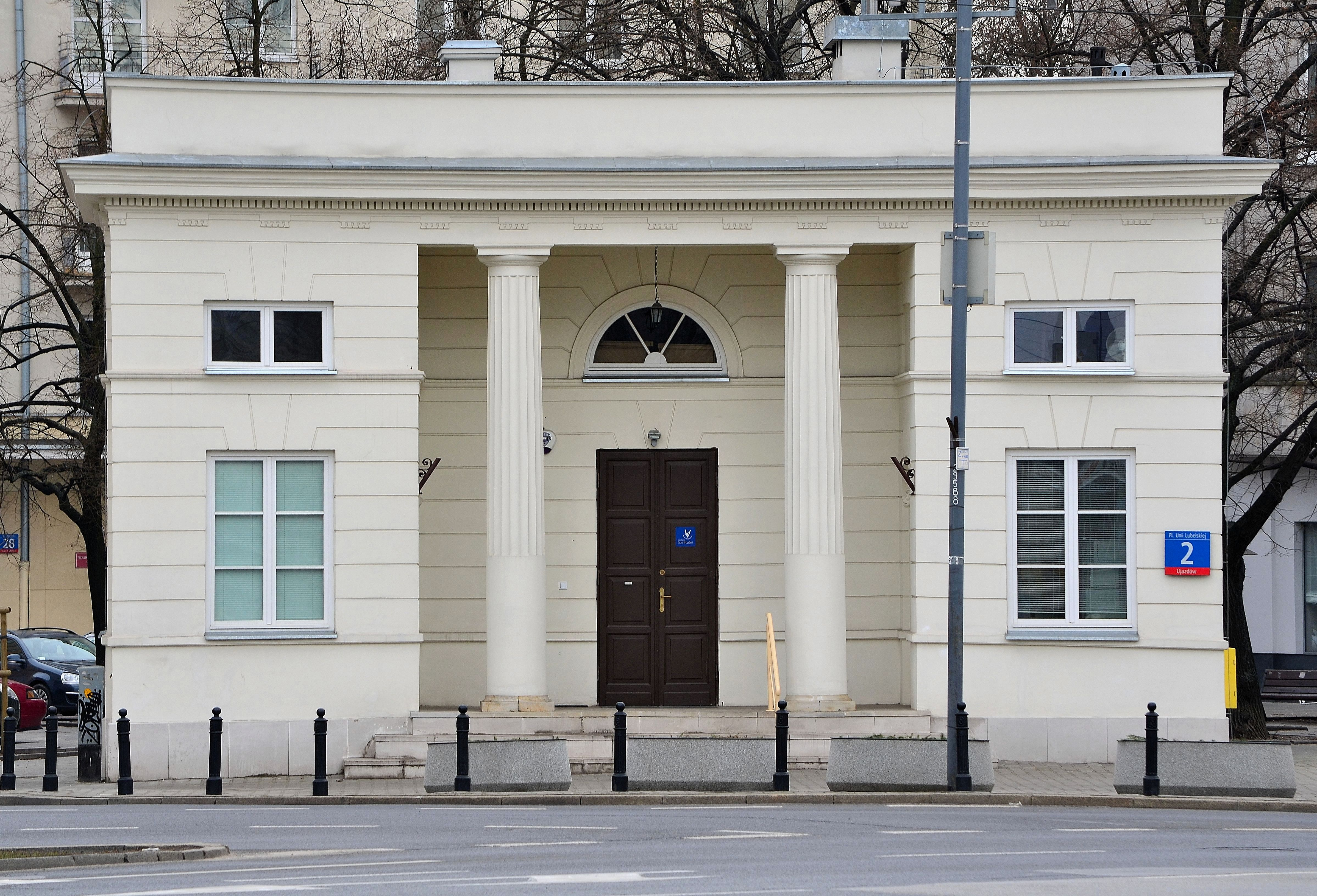 Rogatki Mokotowskie - wschodni domek rogatkowy